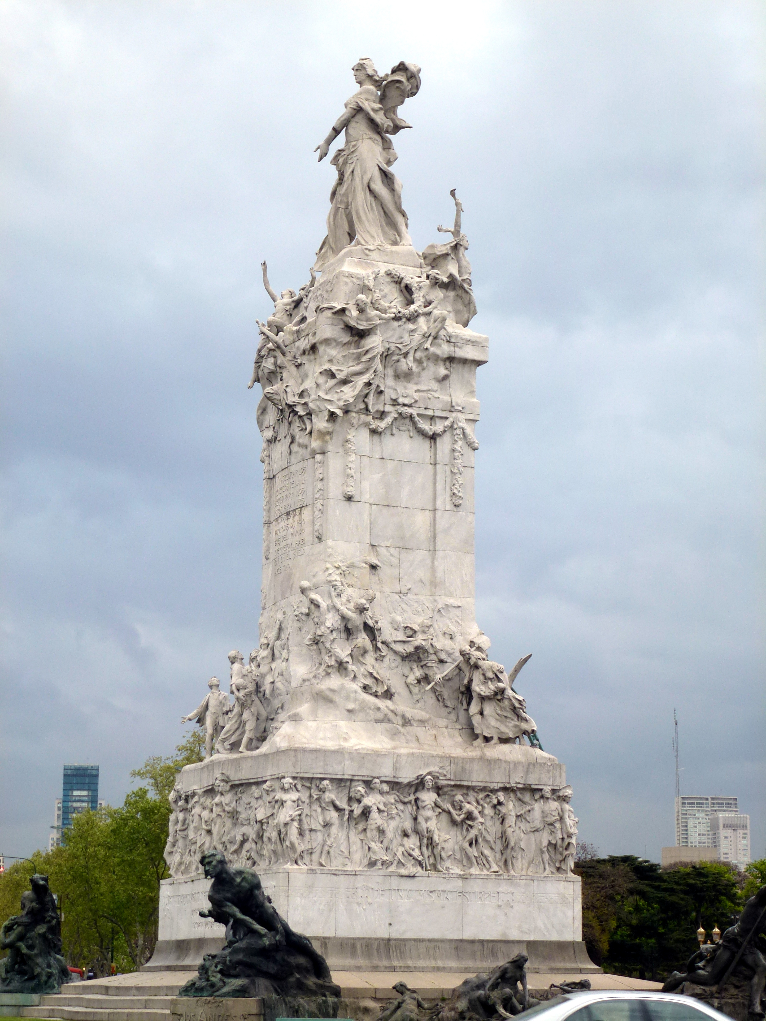 La Carta Magna y las 4 regiones argentinas, más conocido como Monumento de los Españoles, en la intersección de Avenida del Libertador y Avenida Sarmiento, en el barrio de Palermo, Buenos Aires.